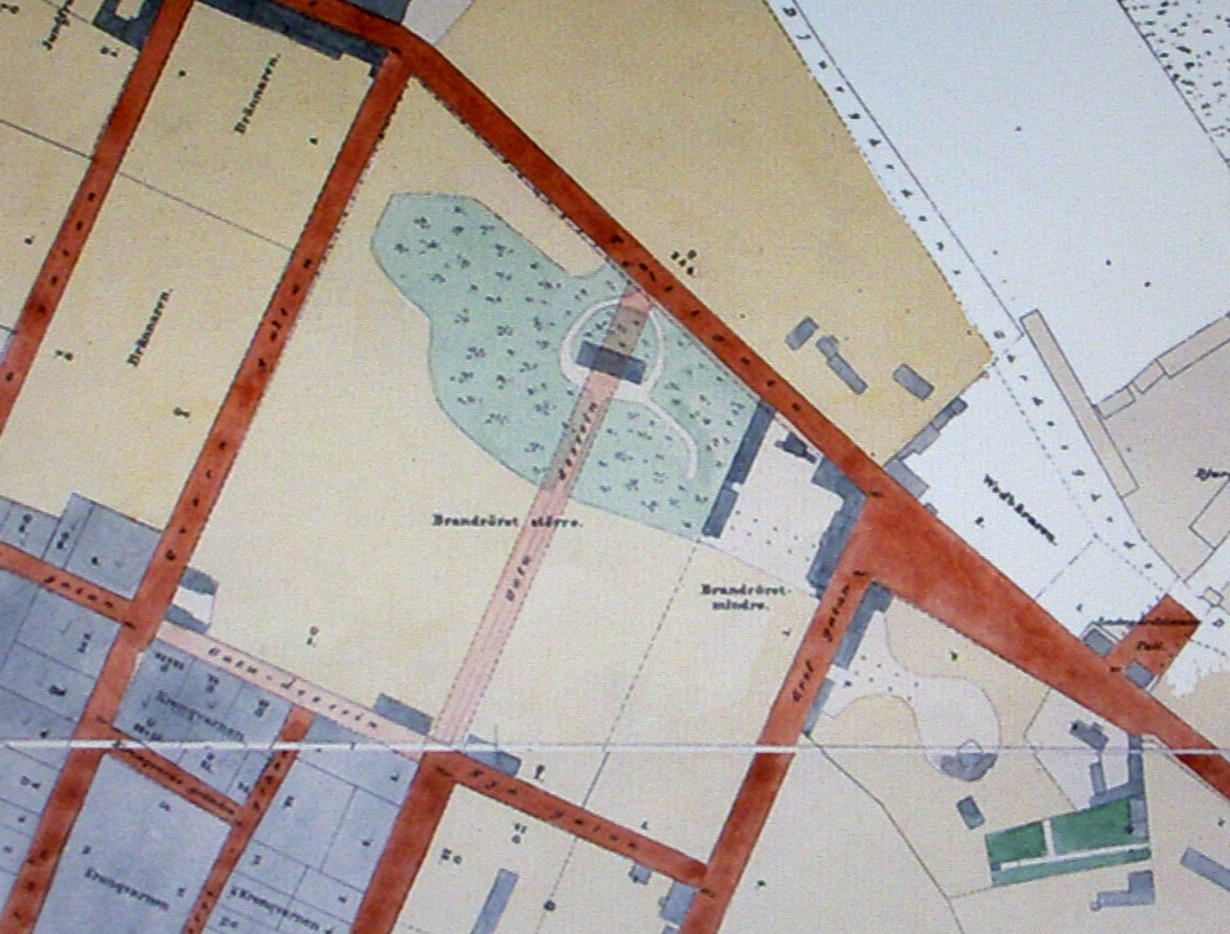 Del av Stockholmskarta från 1863